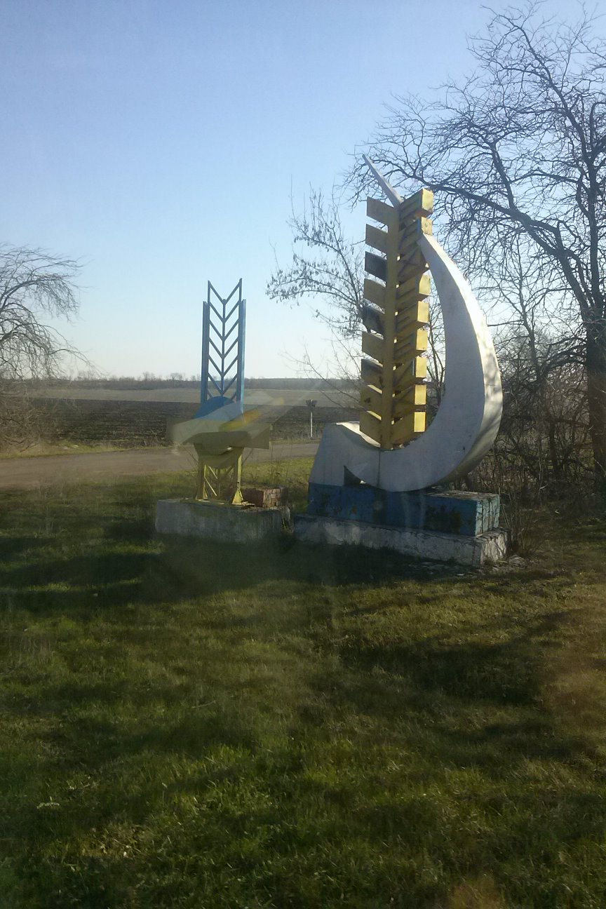 Знак біля села Бахчовик Бойківського району Донецької області